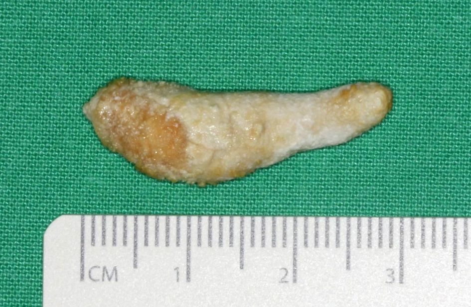 Das Bild zeigt einen Speichelstein aus dem linken seitlichen Mundboden